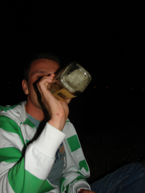 Whiskey drinker